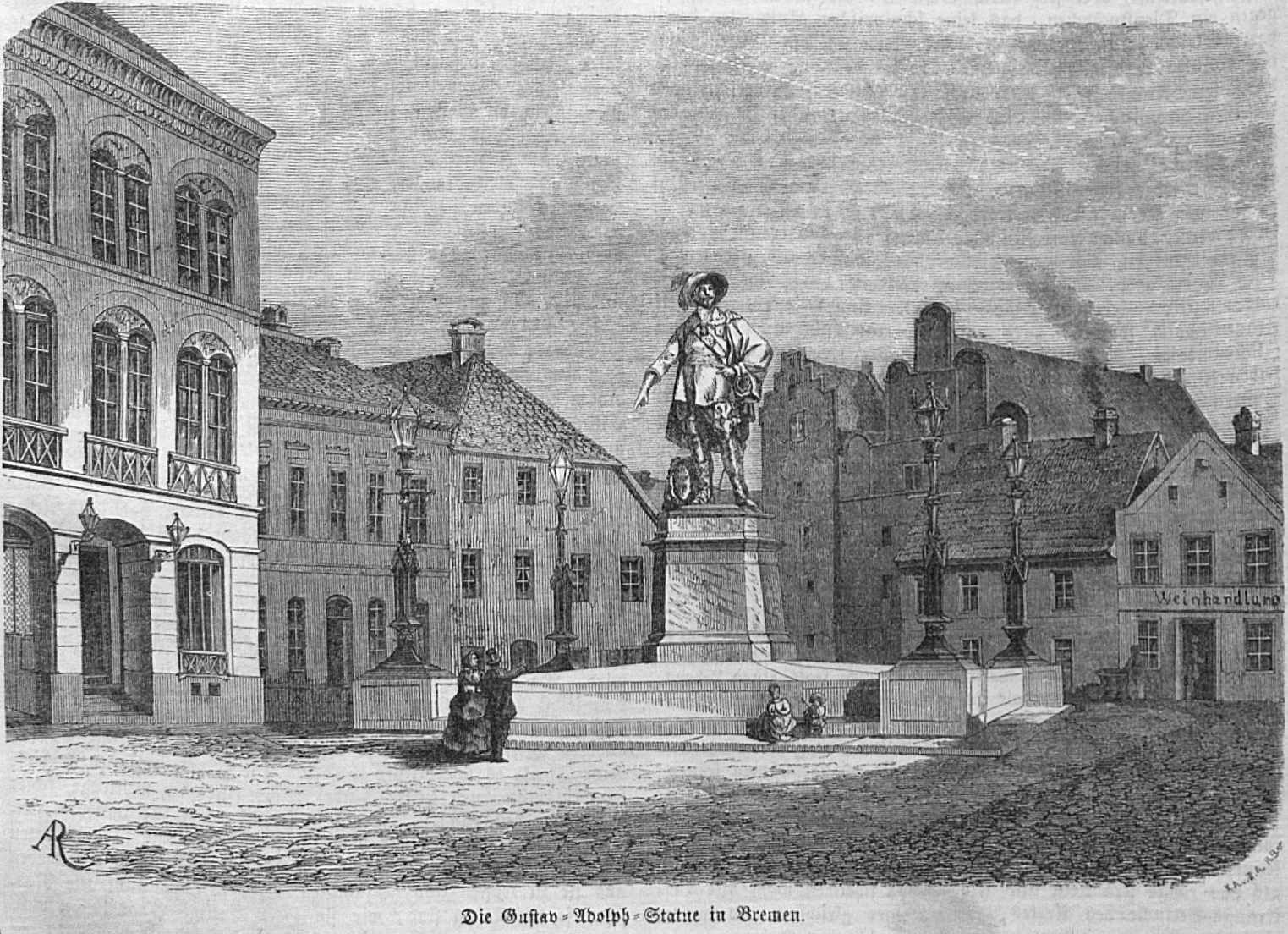 Die Gustav-Adolph-Statue in Bremen